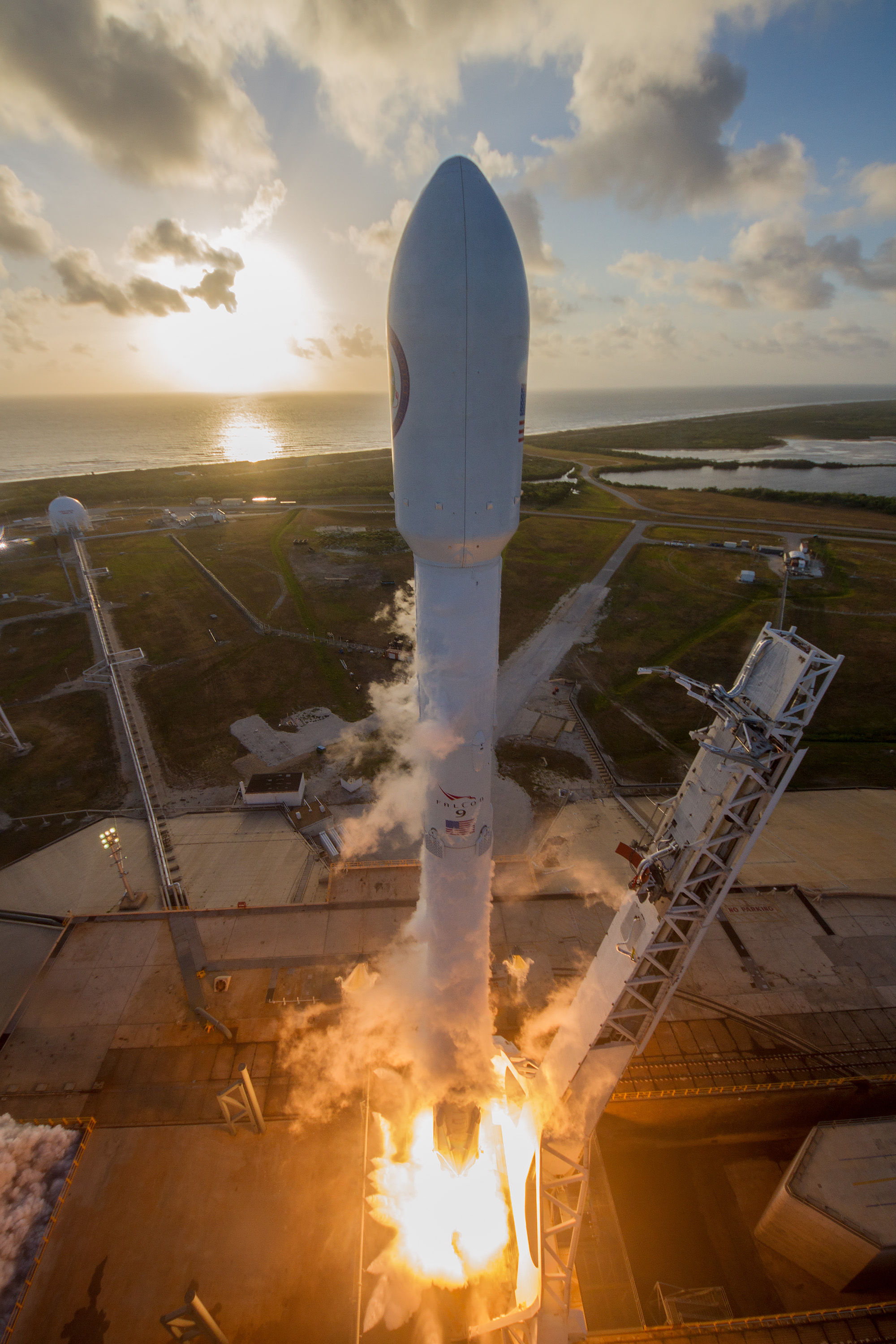 NROL-76 Mission